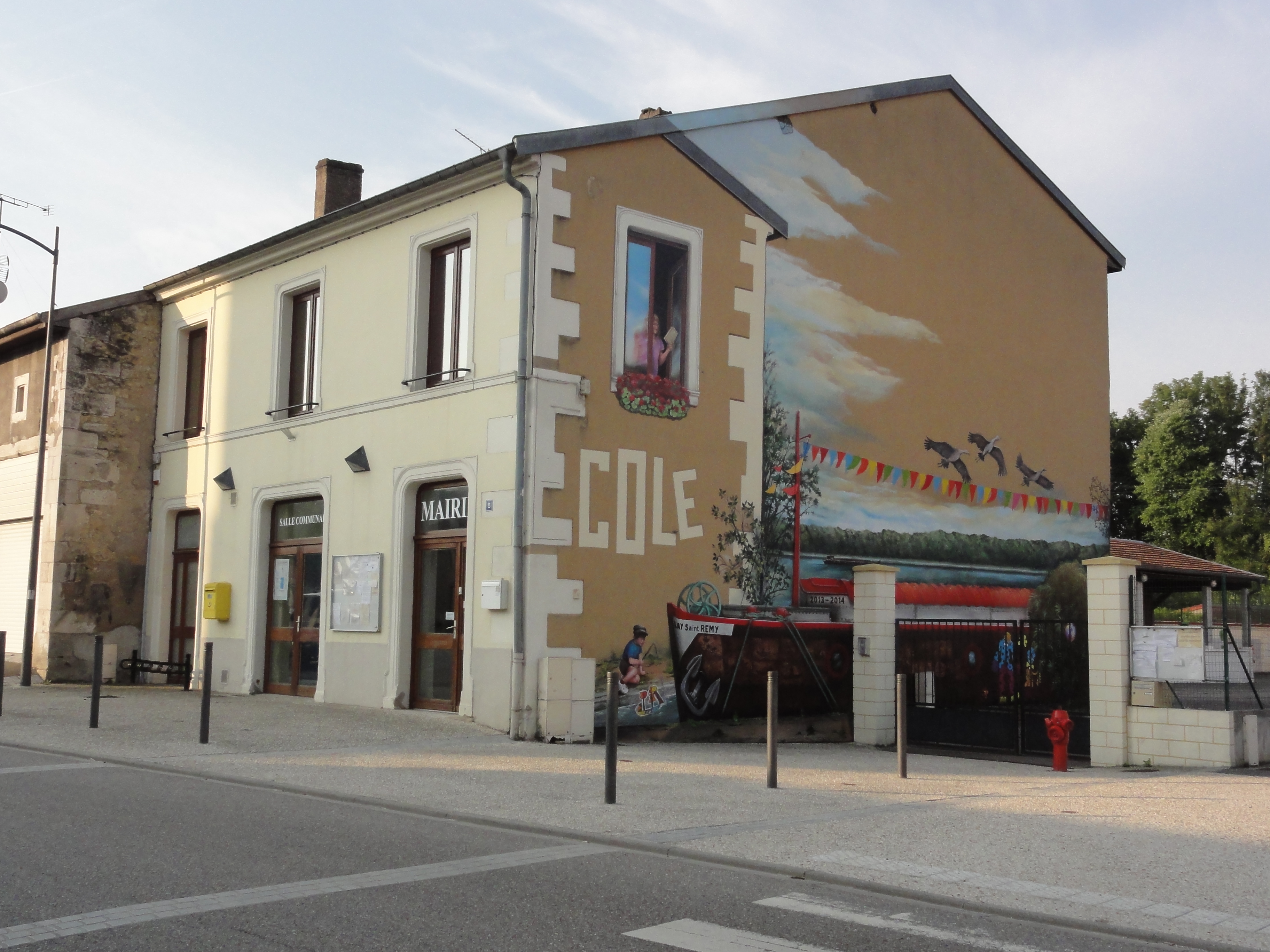 Lay-Saint-Remy (Meurthe-et-M.) école et mairie